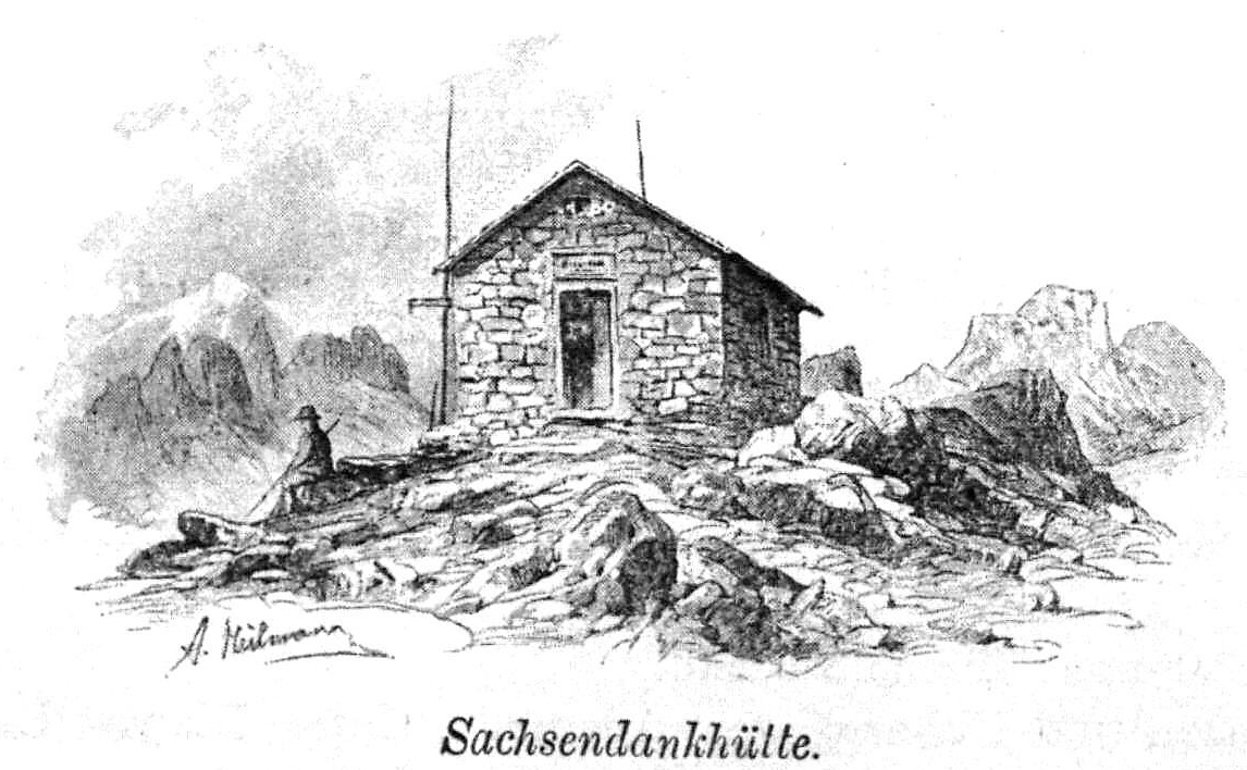 Sachsendankhütte aus Zeitschrift des Deutschen und Oesterreichischen Alpenvereins 1894 Band 25